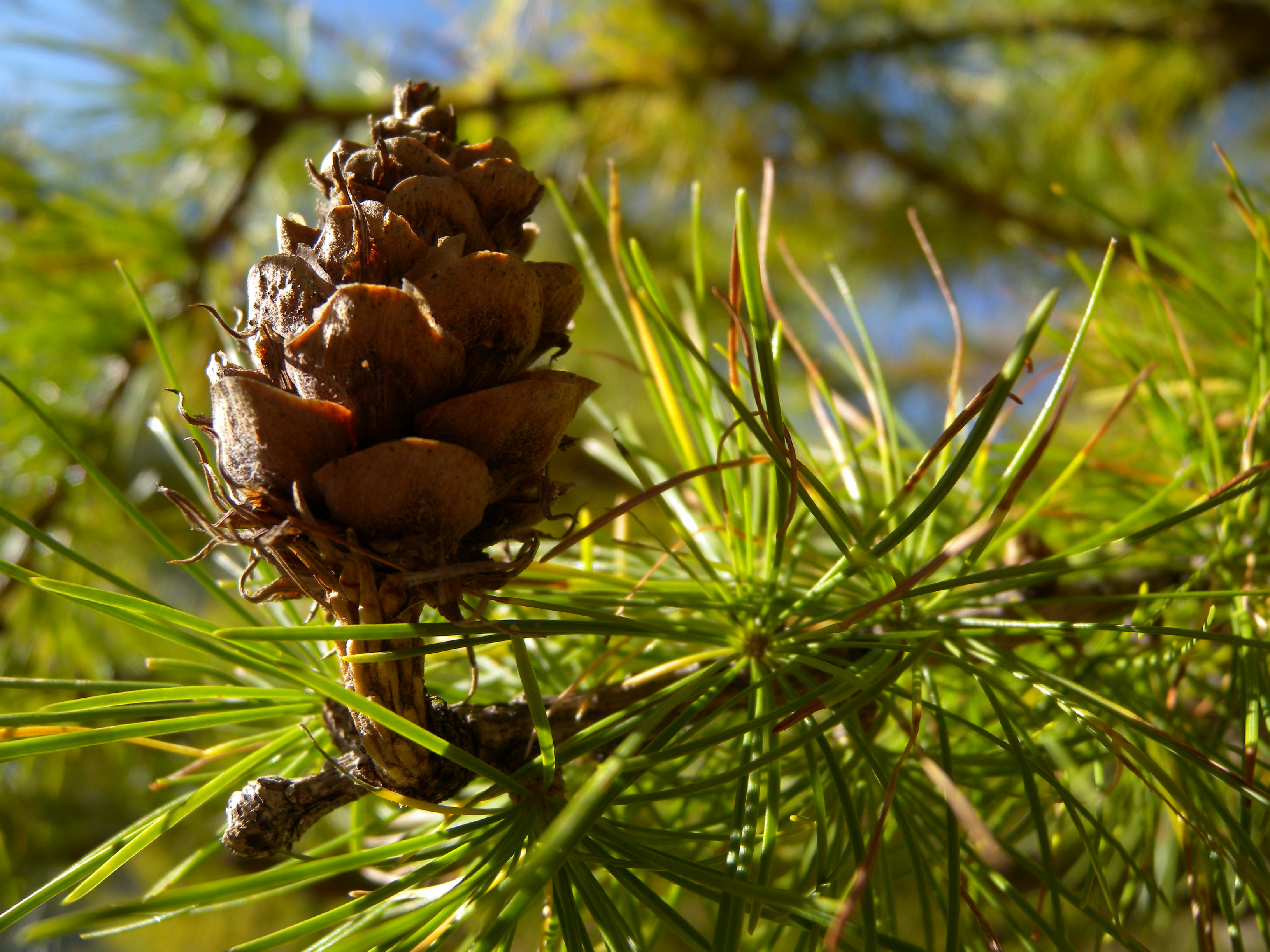 Larix decidua cone and foliage. Embrun, Hautes-Alpes, France.